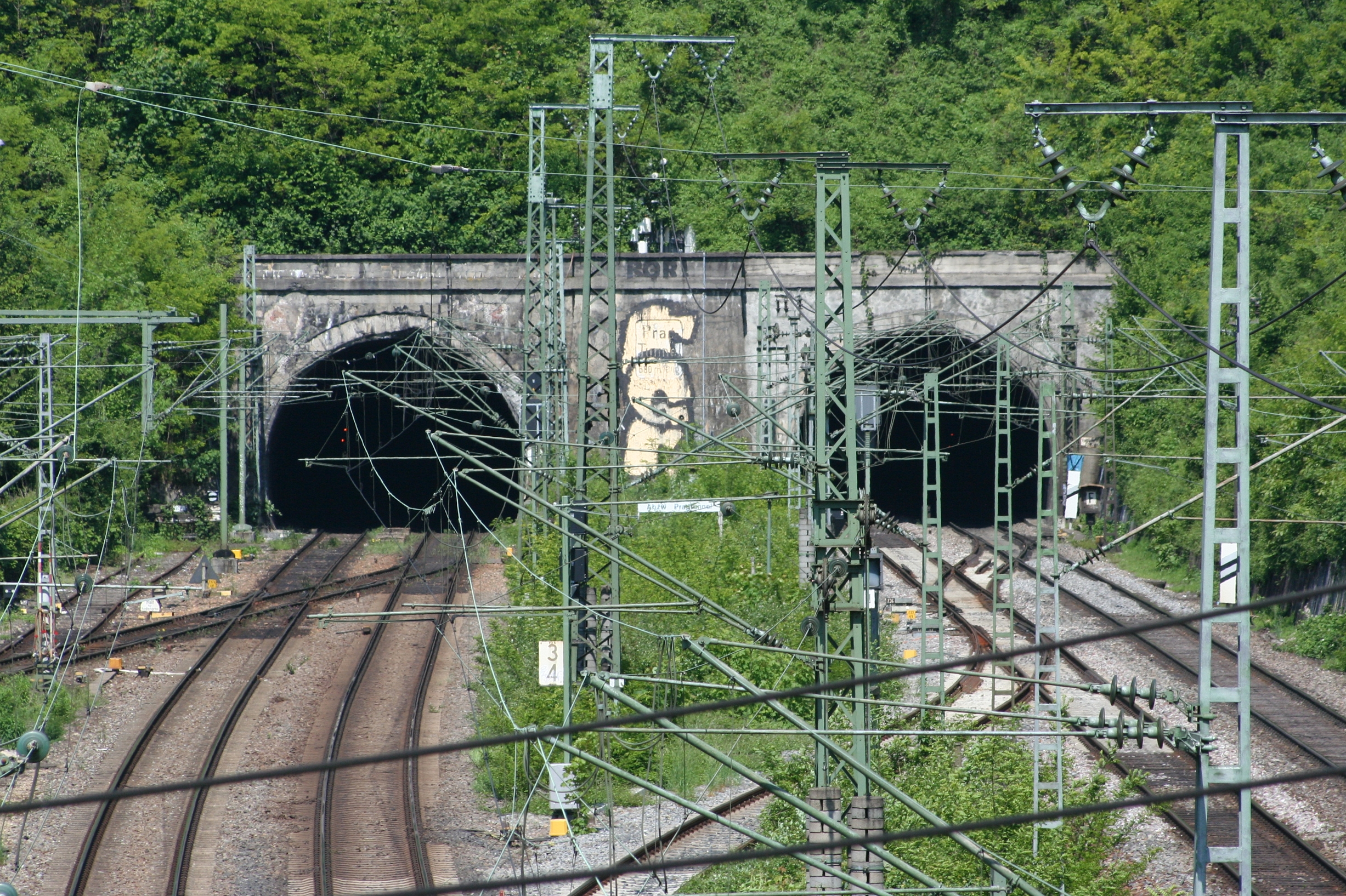 Pragtunnel, Südportal, Stuttgart